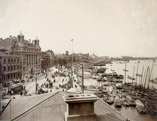 摄于20世纪初的上海外滩租界。